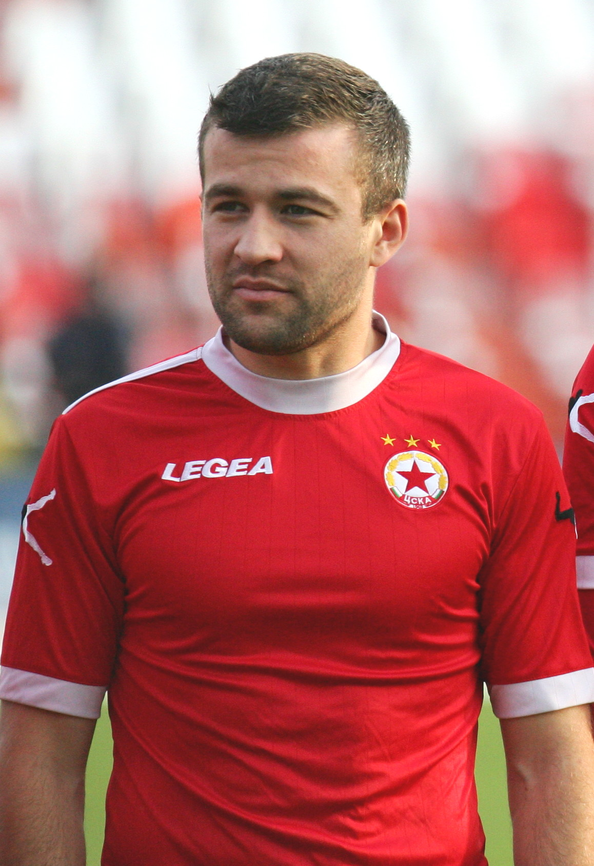 Неманя Милисавлевич (на сръбски Немања Милисављевић) е сръбски футболист, играещ като нападател и ляв защитник. Роден е на 1 ноември 1984 г. в град Брус, бивша Югославия. Състезател от лятото на 2013 г. на ЦСКА.